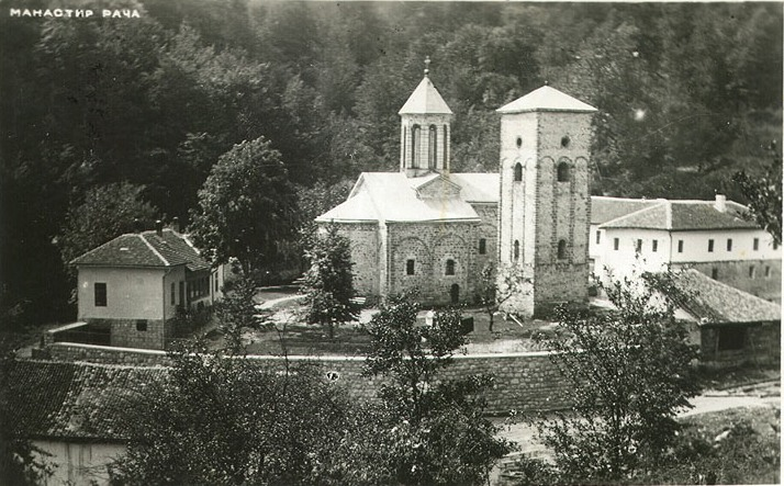 Манастир Рача (old photo)